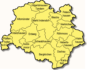 Lage der Gemeinden im Landkreis Dachau